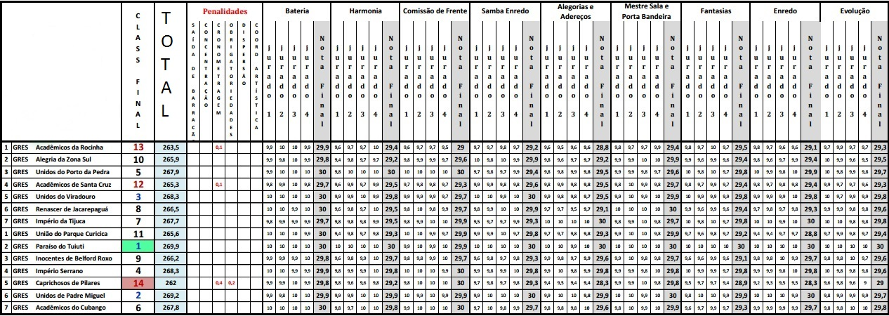 Mapa de notas do Grupo de Acesso (2ª divisão) do Carnaval do Rio de Janeiro em 2016.